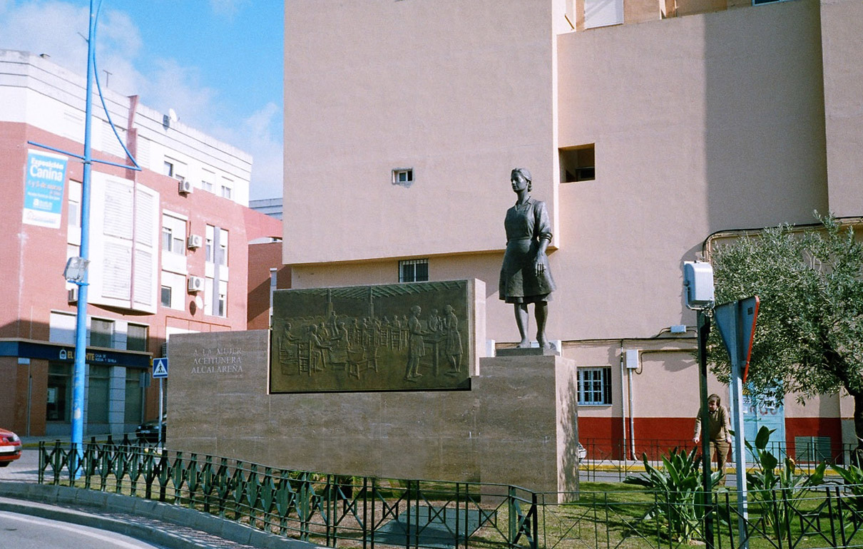 Monumento a la mujer aceitunera en Alcalá de Guadaíra (Sevilla). Año 2004